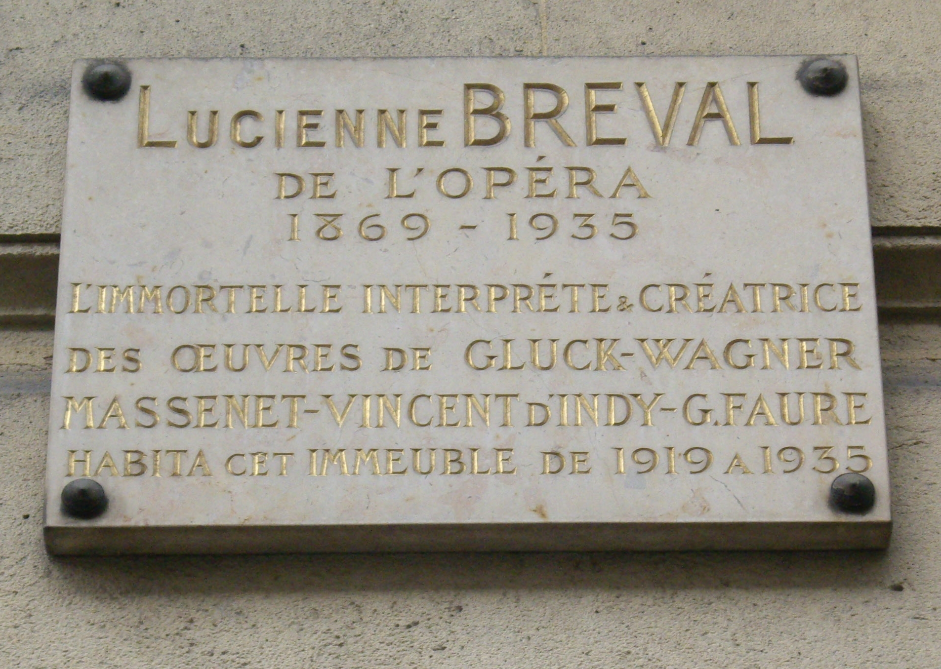 Plaque apposée au n° 58 de la rue de Courcelles, Paris 8e. « Lucienne Breval, de l'Opéra, 1869-1935, l'immortelle interprète et créatrice des œuvres de Gluck, Wagner, Massenet, Vincent d'Indy, G. Fauré, habita cet immeuble de 1919 à 1935. »